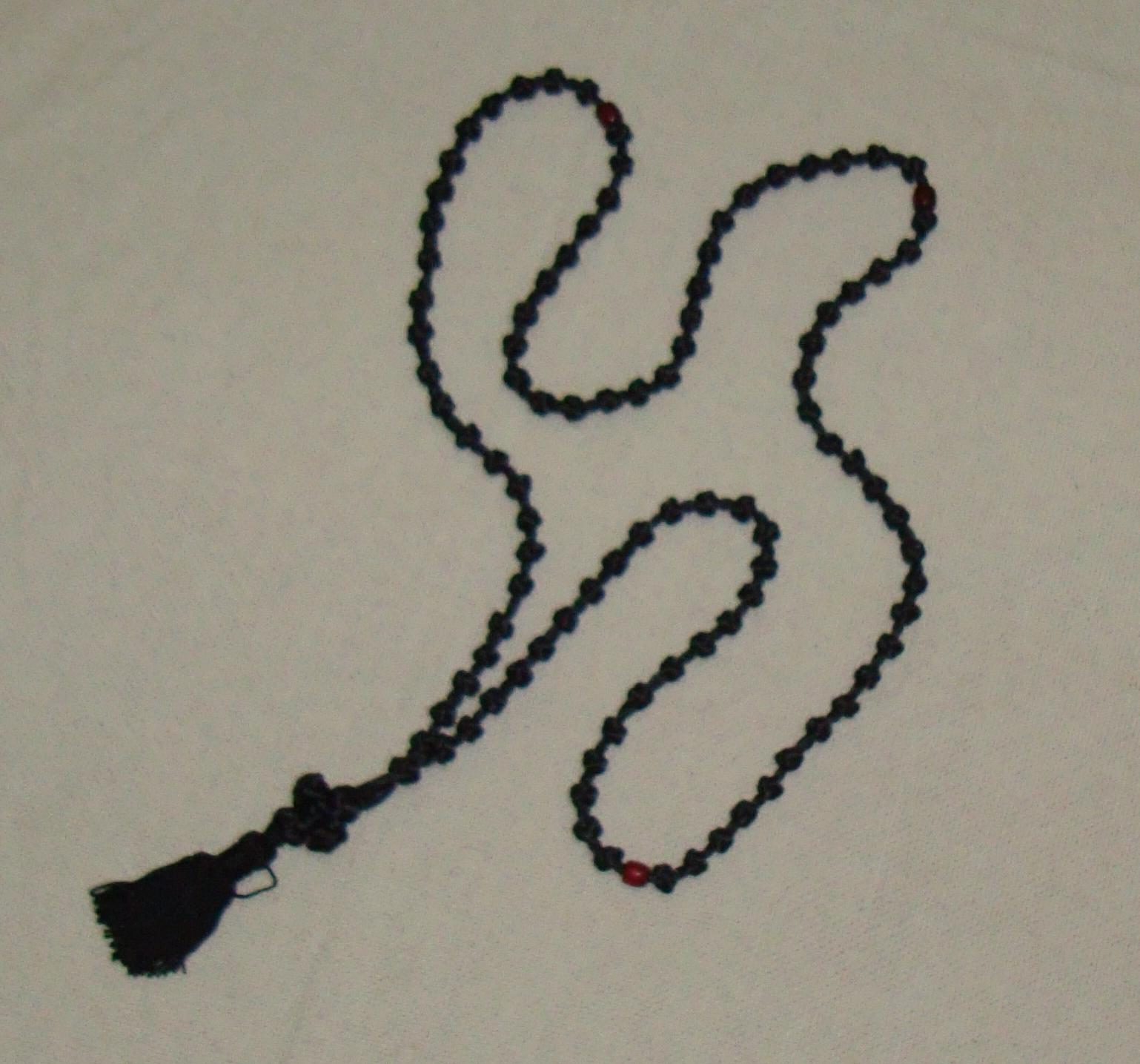 Komboskini.